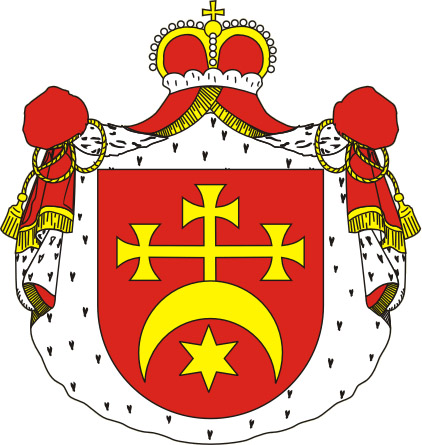 Перший герб Броварів